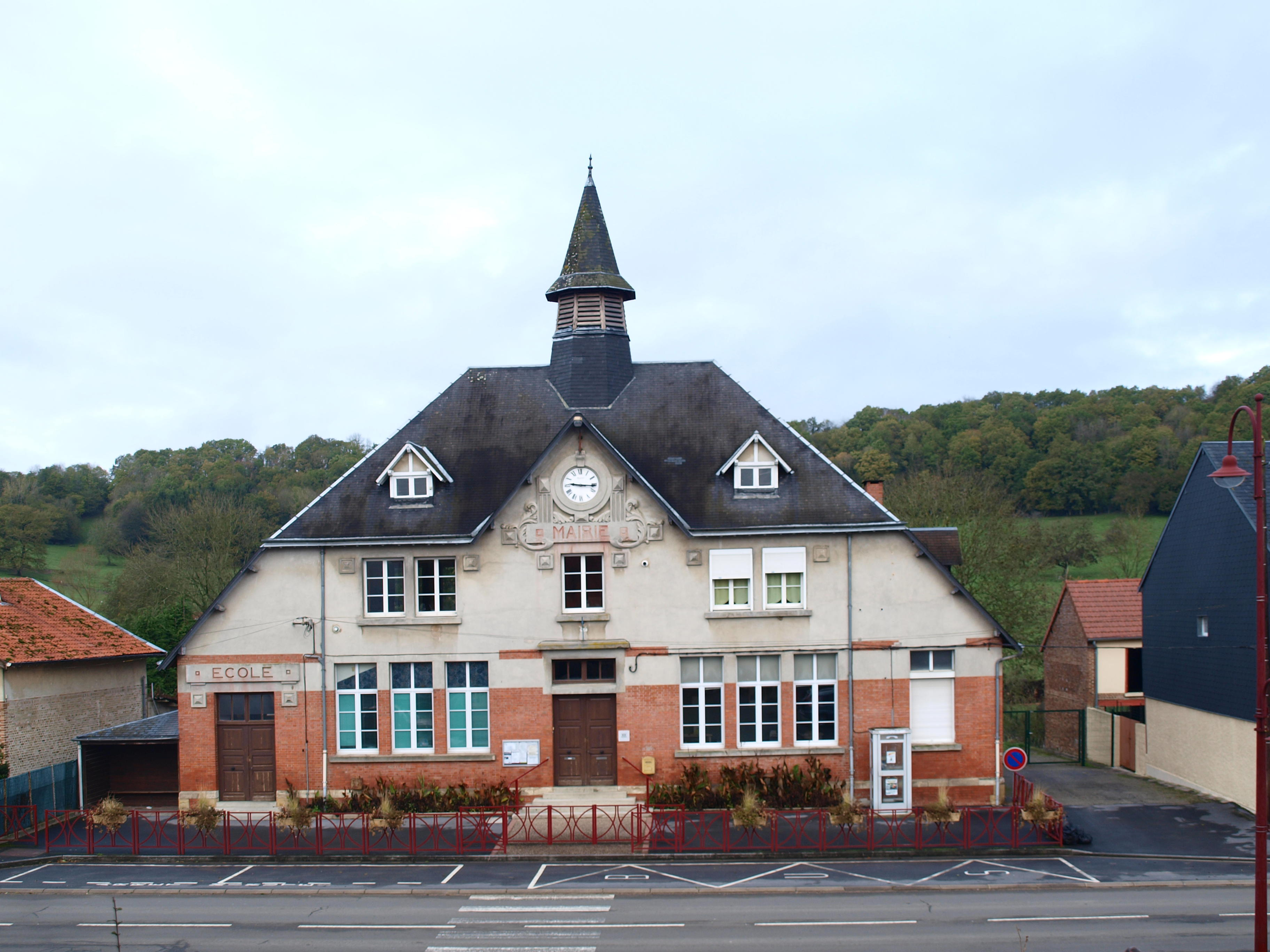 Ballay (Ardennes, France) ; mairie